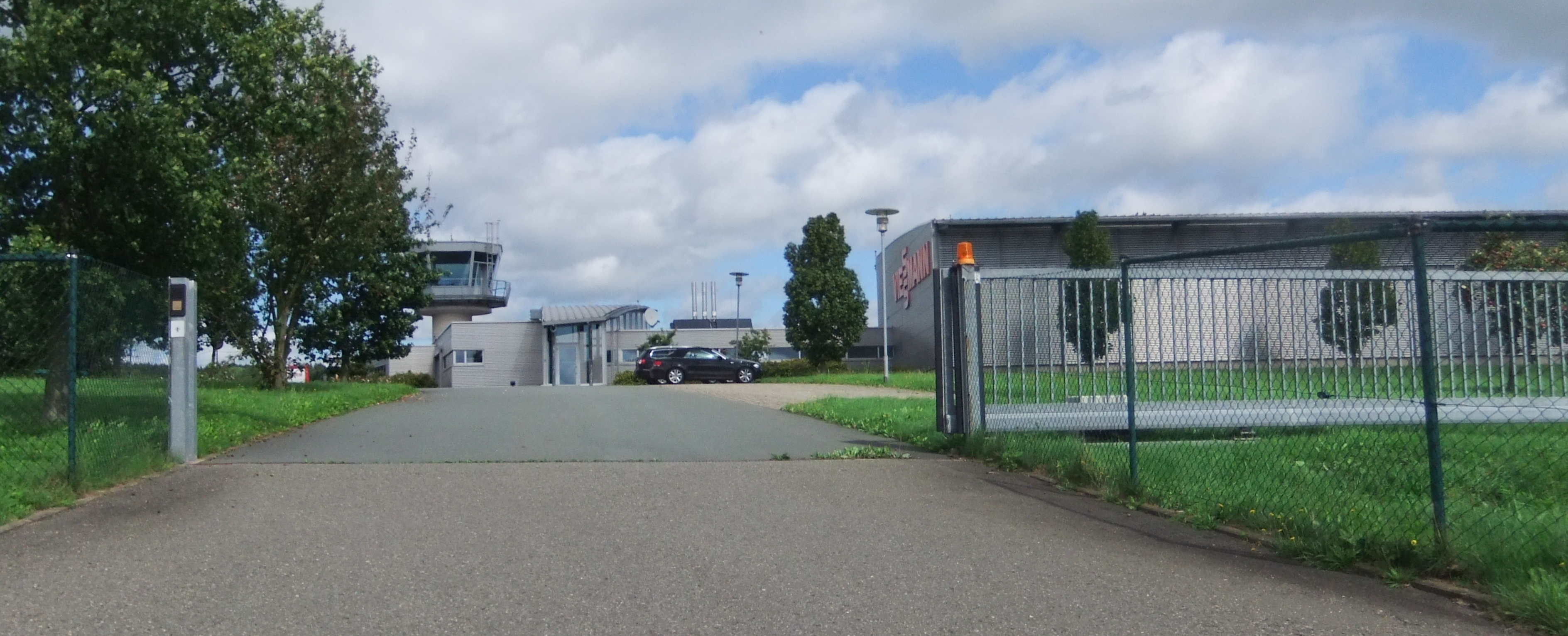 Flugplatz Allendorf (EDFQ)